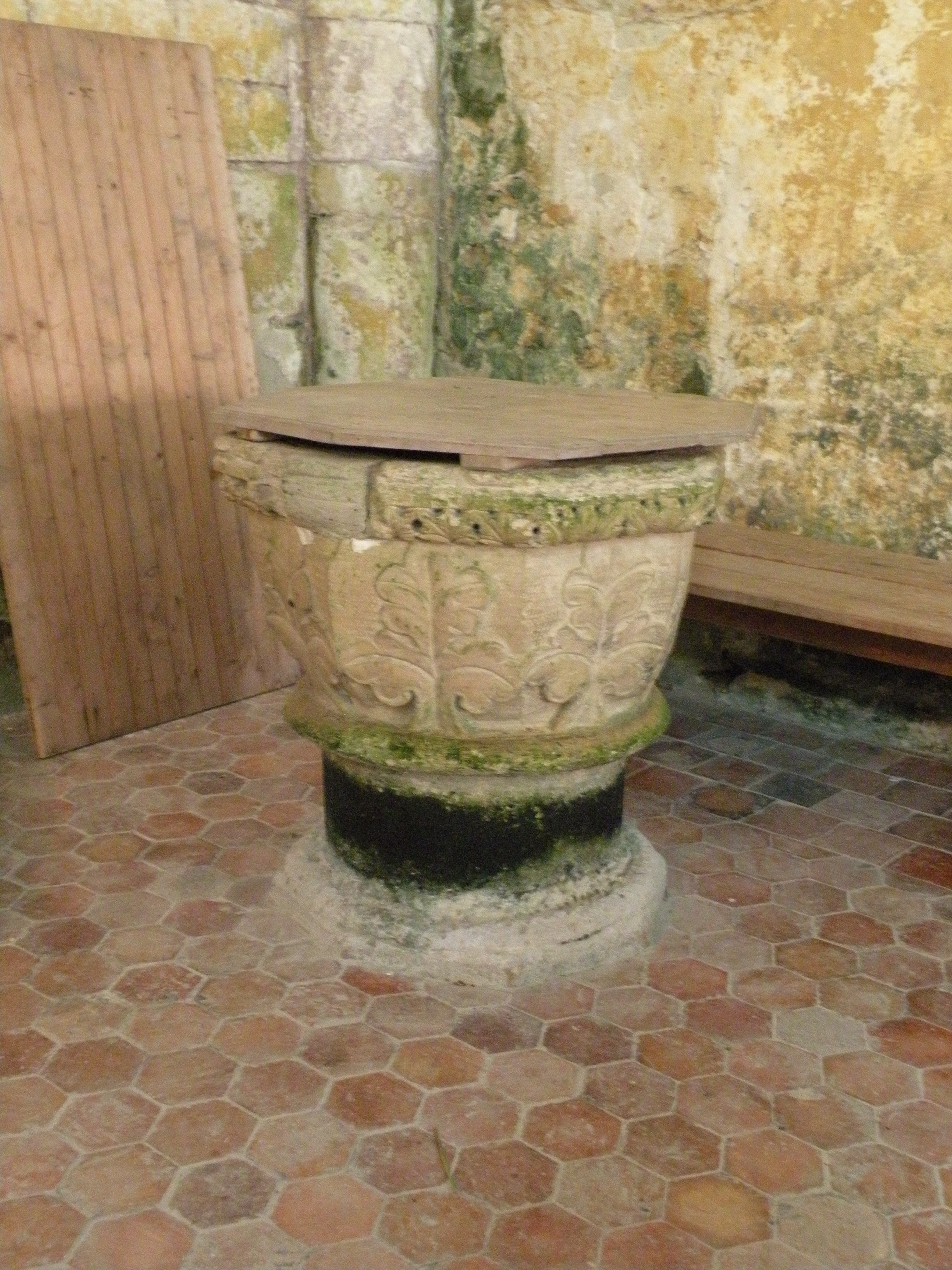 Interieur de l'église Notre-Dame de Fontenay-Torcy